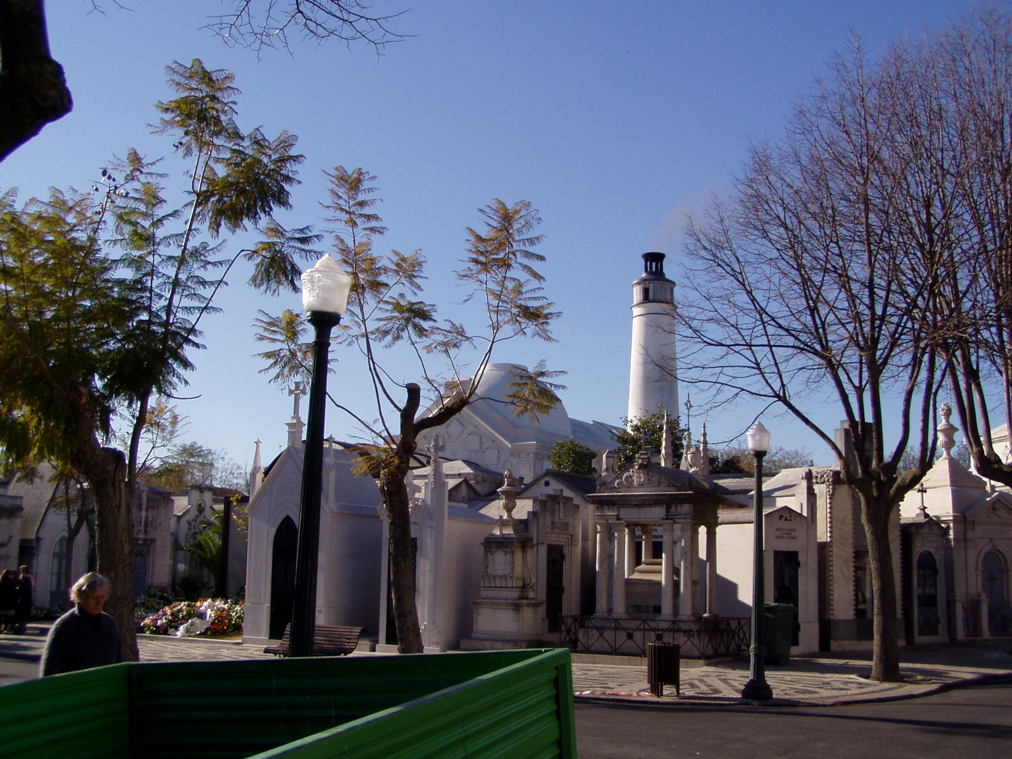 Крематорий кладбища Алту в Лиссабоне, Португалия